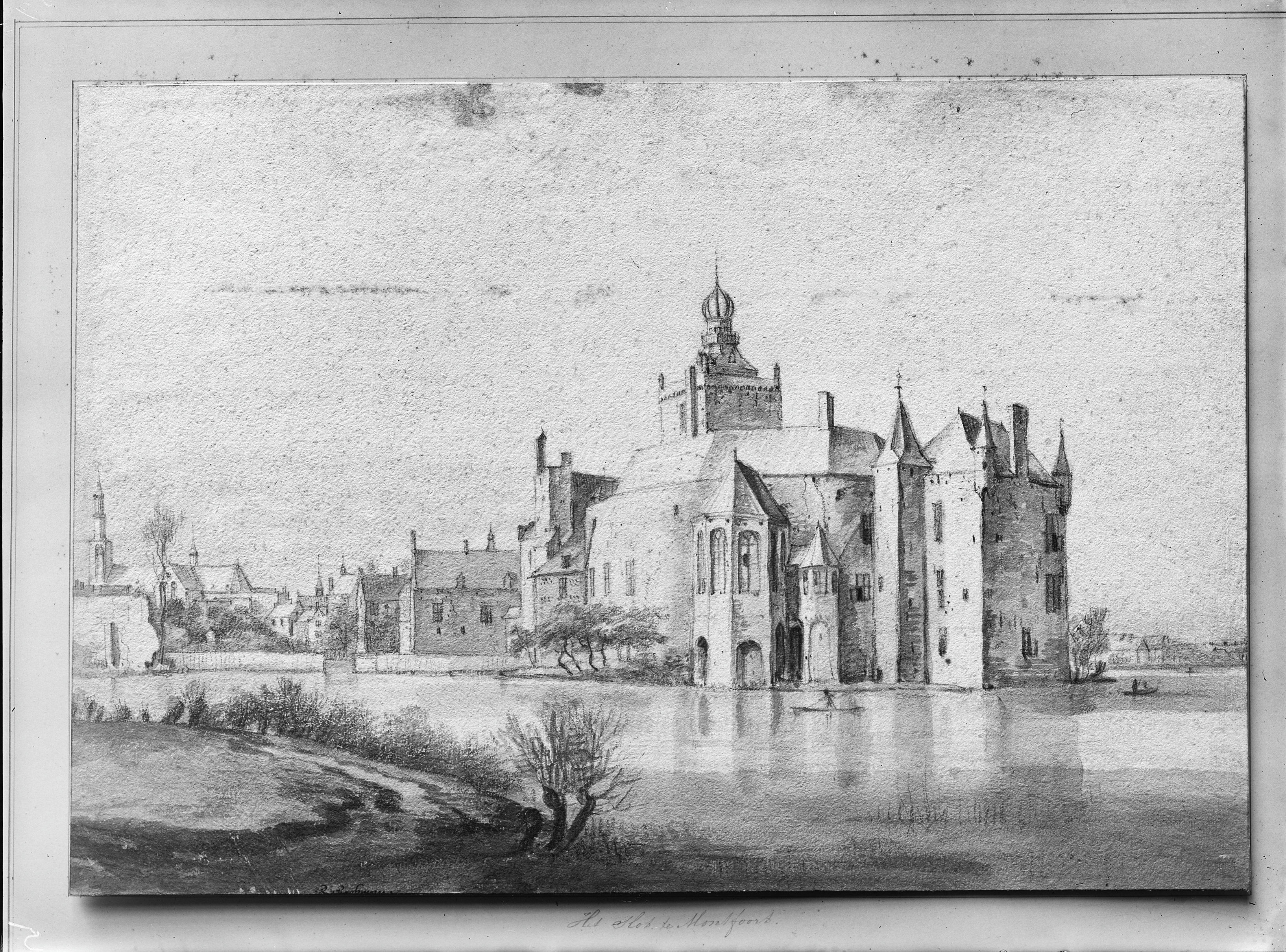 Kasteel Montfoort: naar Oostindische inkttekening door R.Roghman, in het Museum Teyler Haarlem